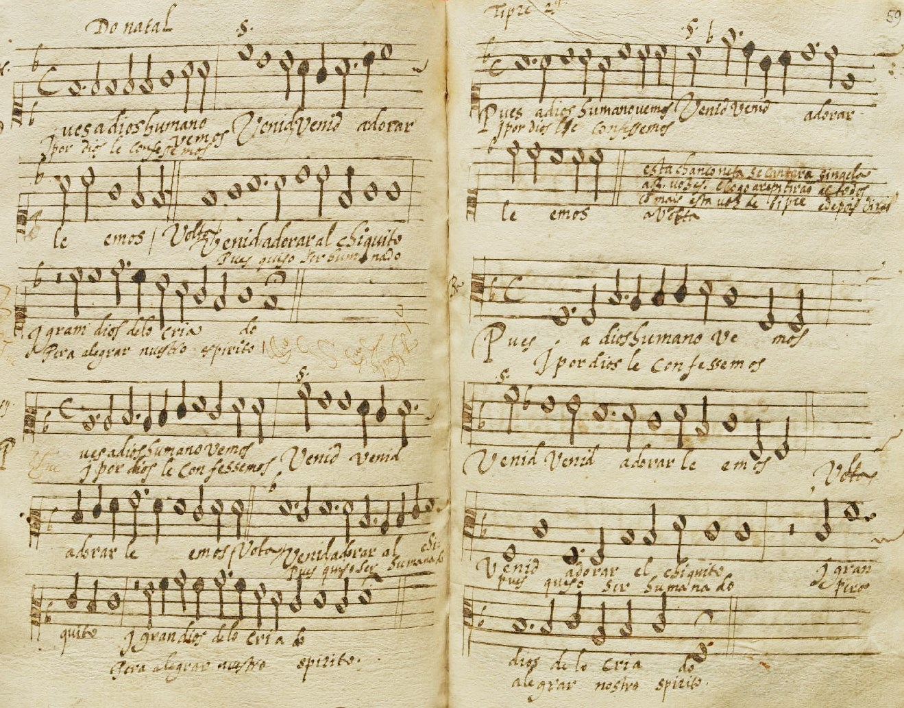 Primeiras páginas do Cancioneiro de Belém, um dos cancioneiros renascentistas portugueses. A composição é Pues a Dios humano vemos e destina-se à celebração do Natal.